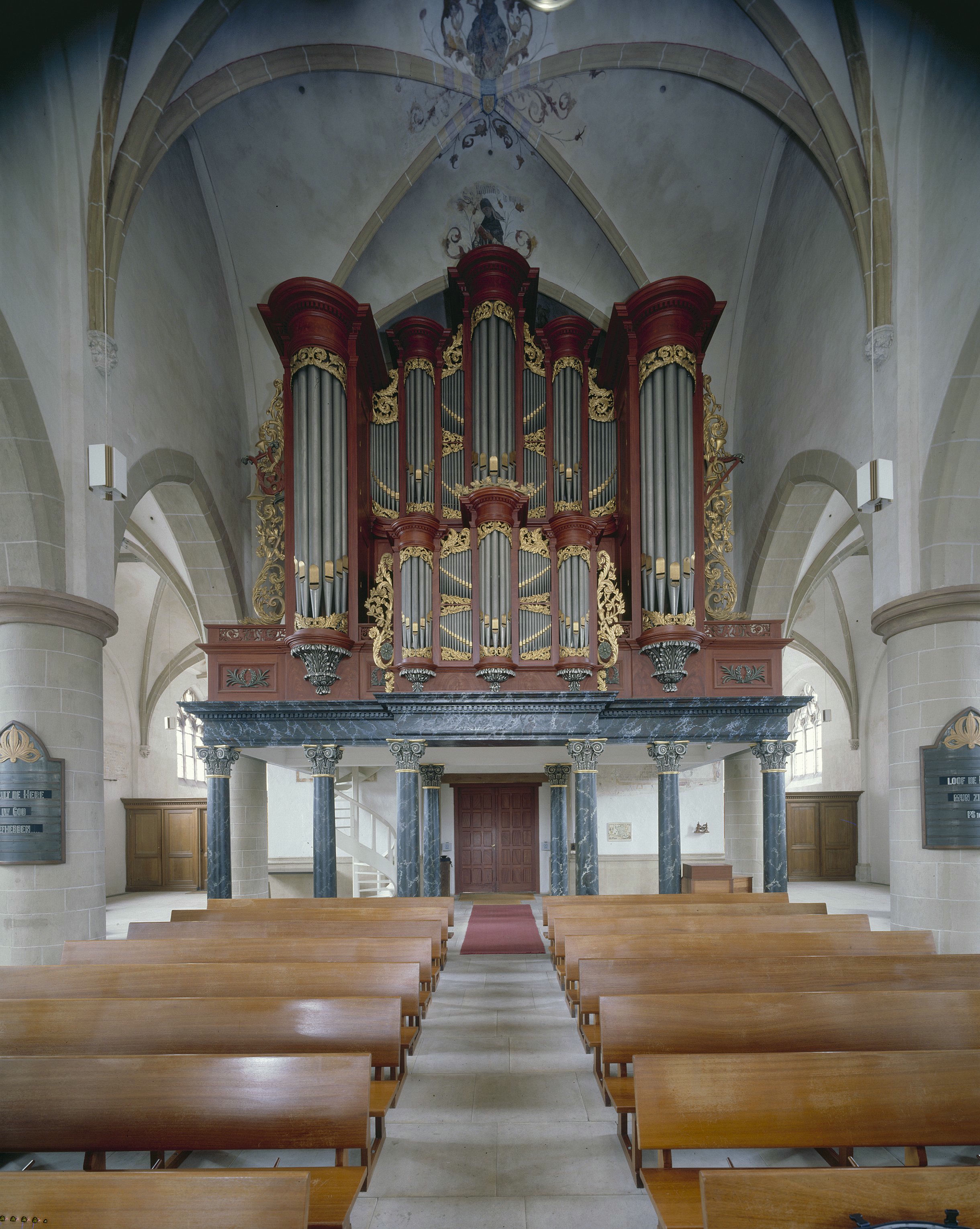 Hervormde Jacobskerk: Interieur, aanzicht Naberorgel (opmerking: Gefotografeerd voor Het Historische Orgel in Nederland 1819-1840, bladzijde 321)